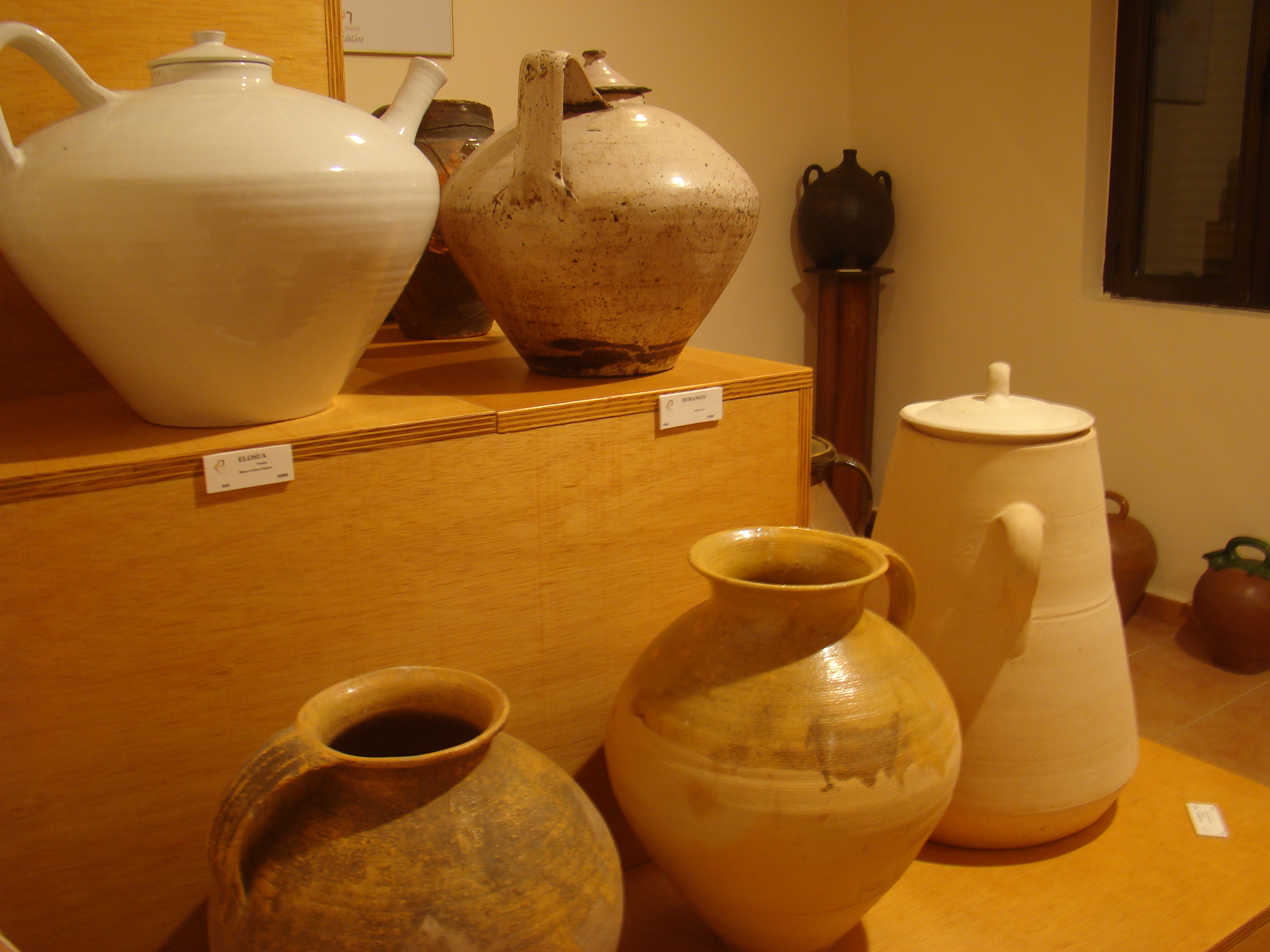 Museo del cántaro en la localidad de Valoria la Buena en la provincia de Valladolid, España. En el estante superior dos pedarras de Elosua y Durango; y debajo, en el centro un cántaro melado de Niñodaguía, y a su derecha una natera con tapa y porte de sella.